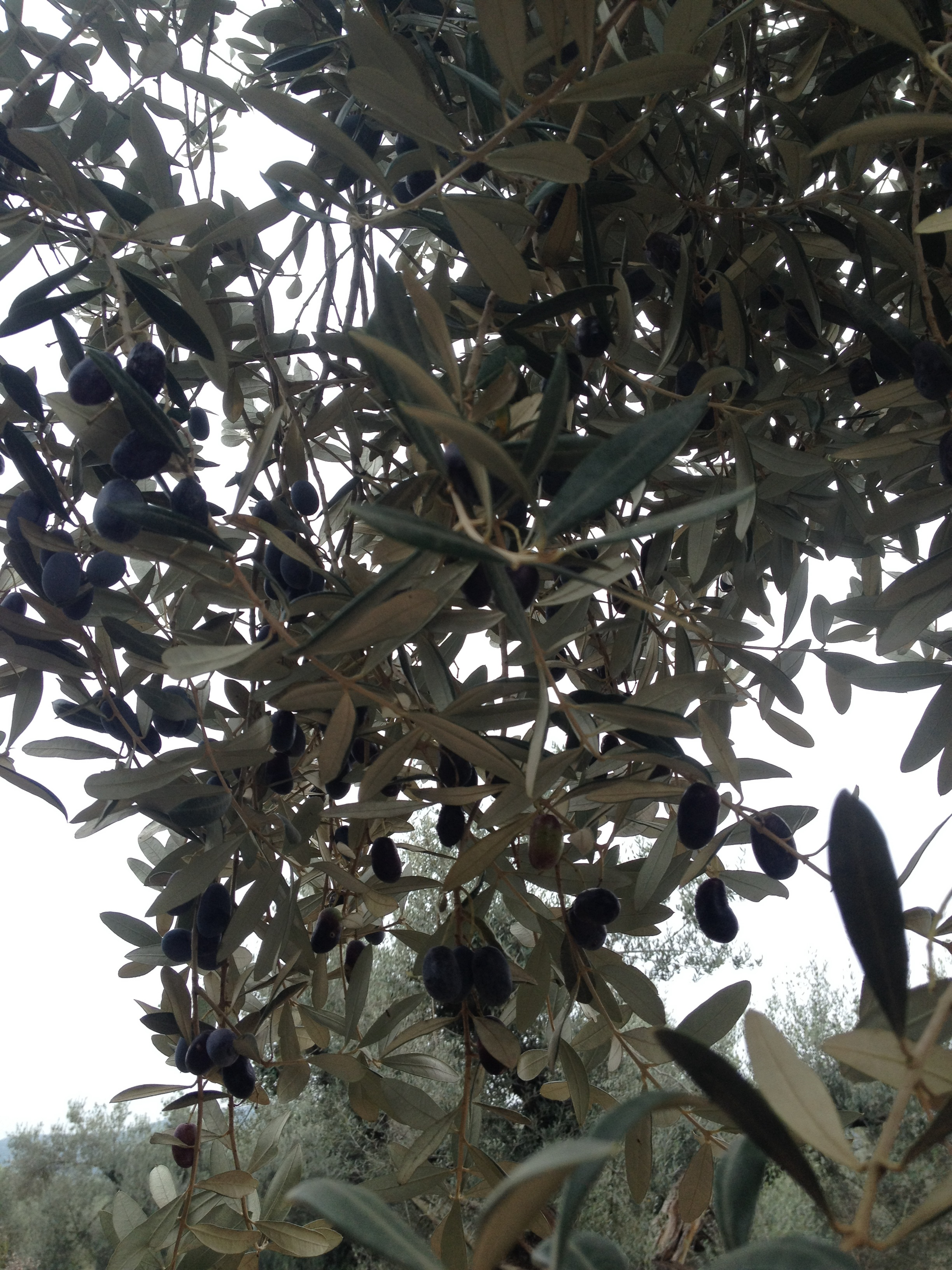 Detall d'olives de la varietat 'farga', pròpies de les Terres del Sénia.